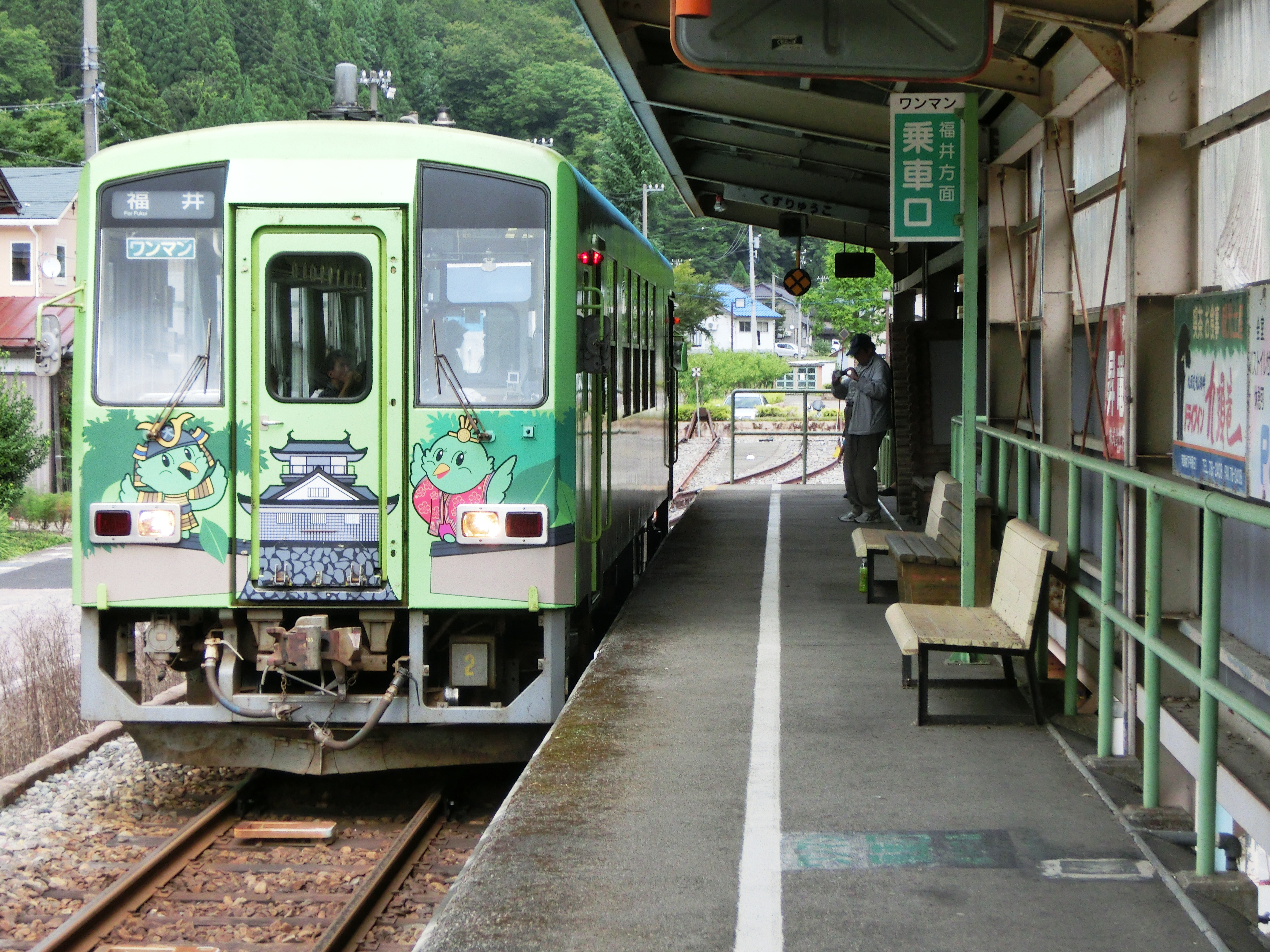 九頭竜線ラッピング車両のキハ120形が停車中の九頭竜湖駅ホーム。